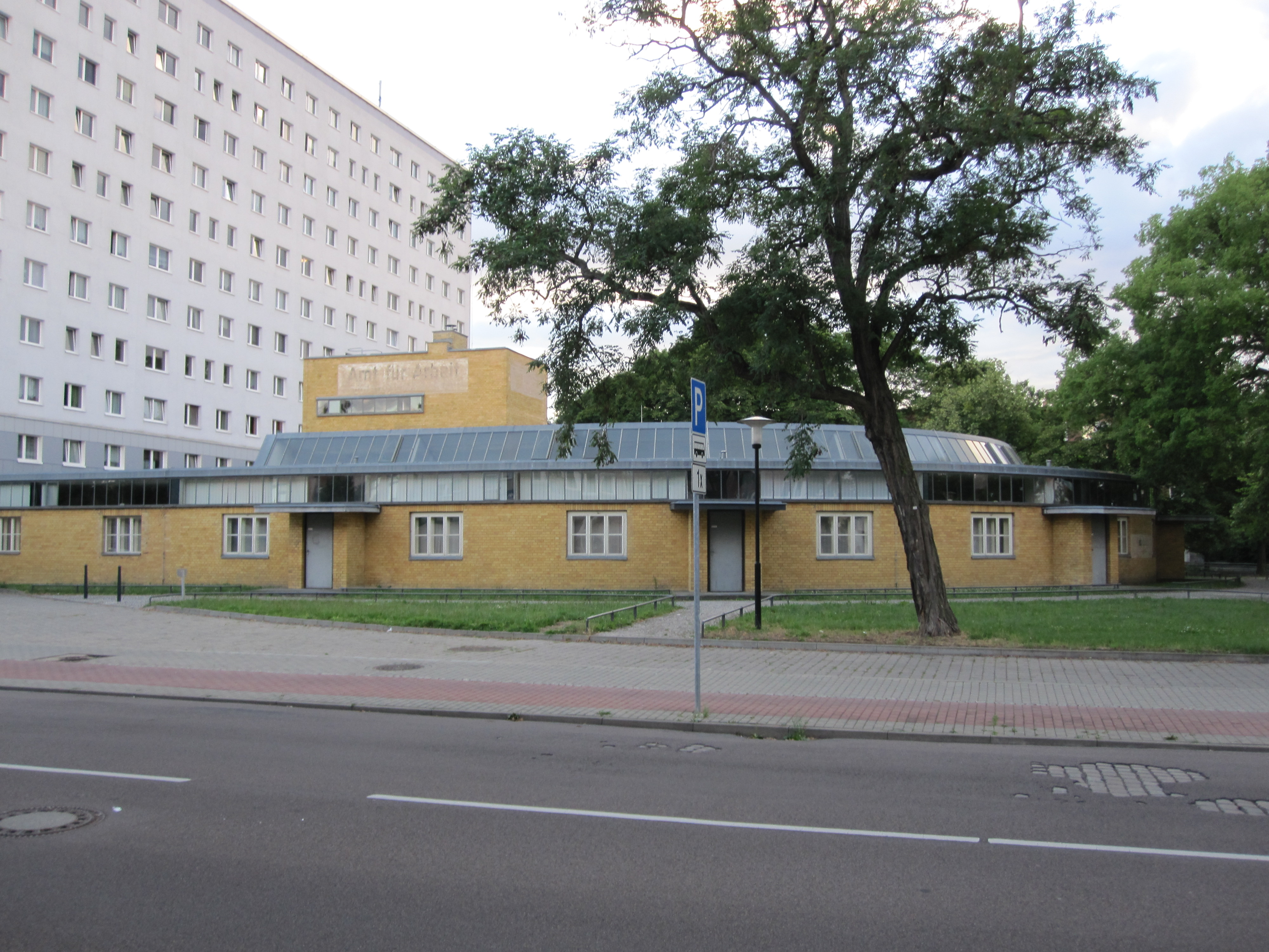 Arbeitsamt von Walter Gropius; erbaut 1928–29